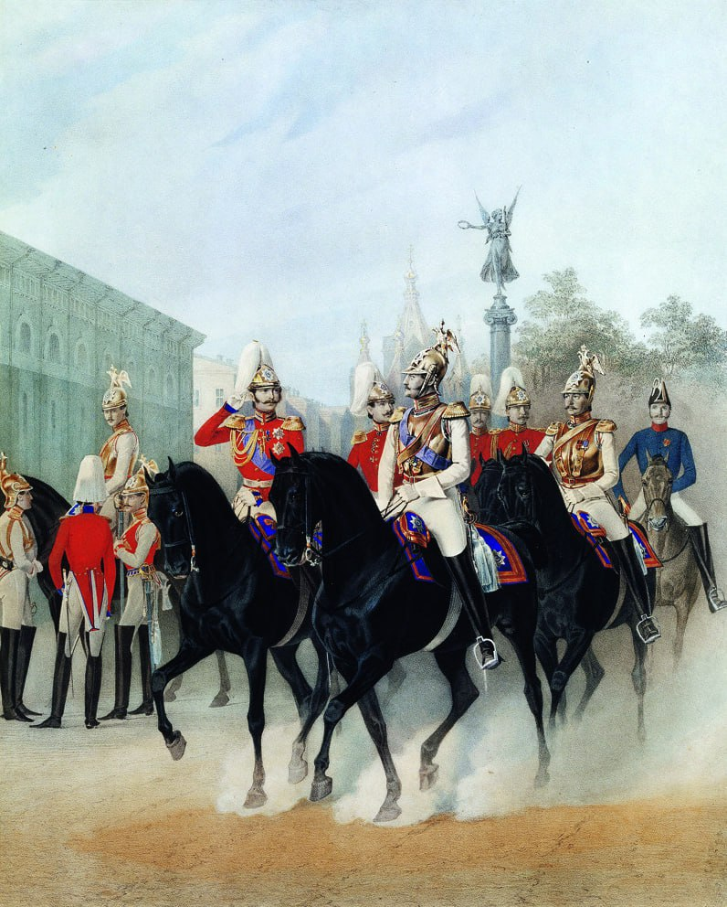 Среди офицеров полка - Ланской, Пётр Петрович.